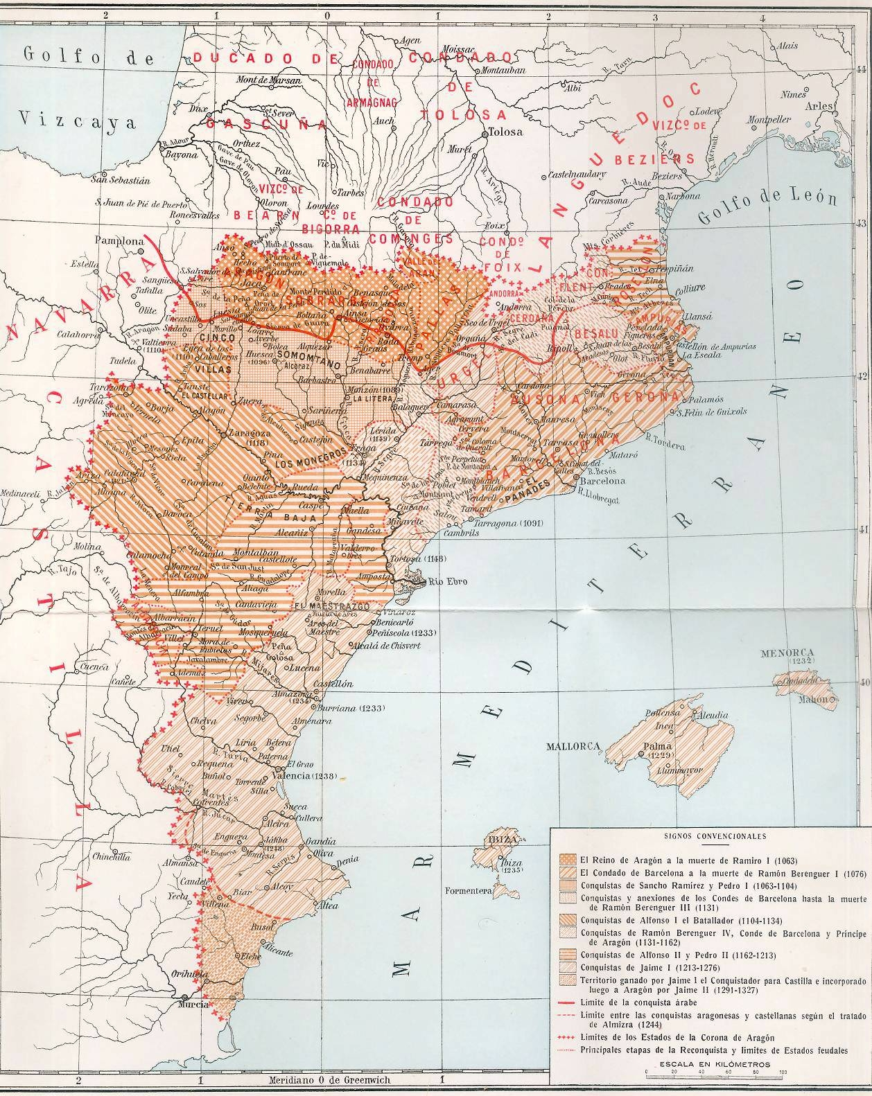 «Conquistas de la Corona de Aragón», en Andrés Giménez Soler, La Edad Media en la Corona de Aragón, Madrid, Labor, 1930.